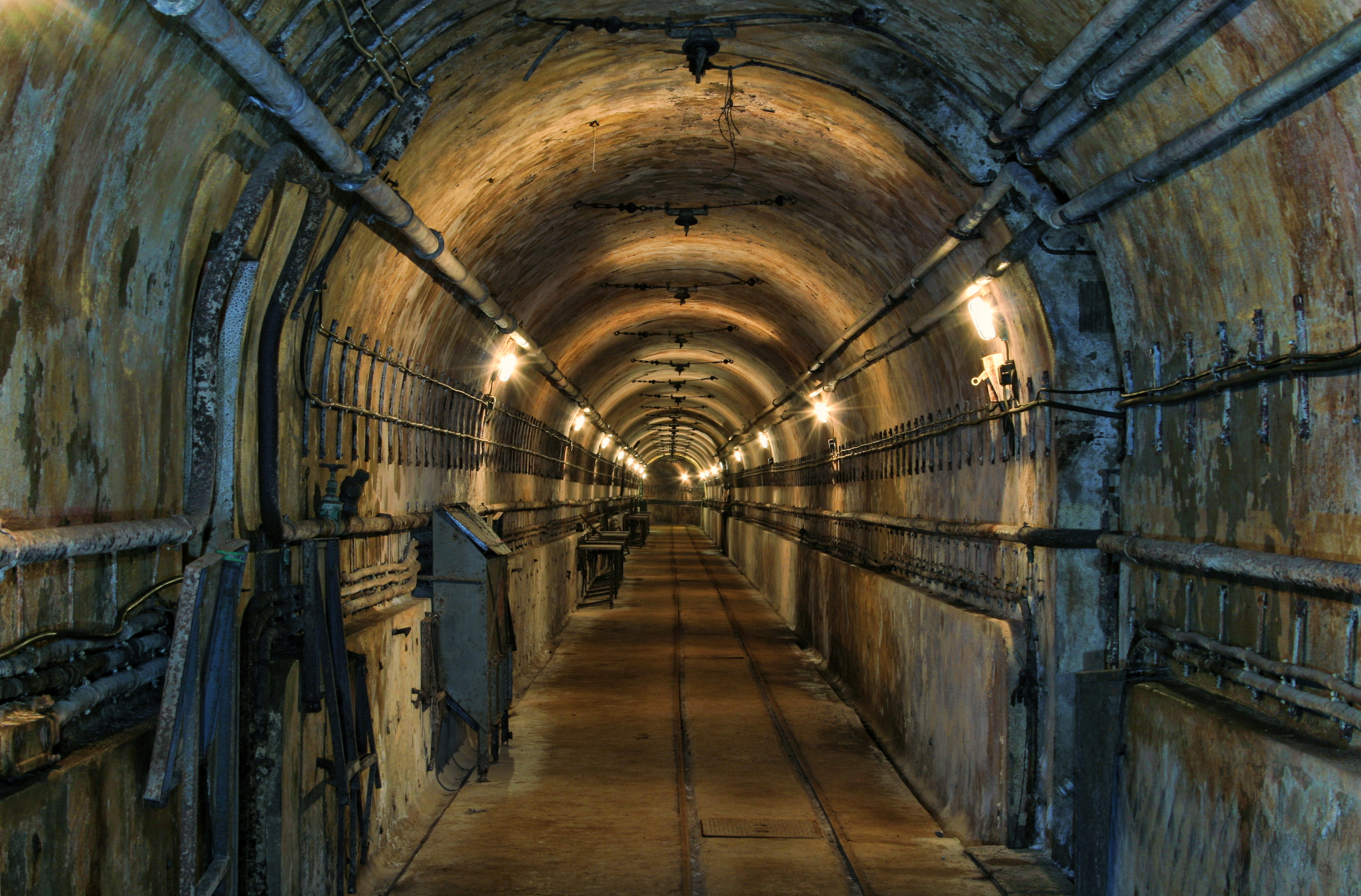 Gros Ouvrage du Michelsberg - Hohlgang